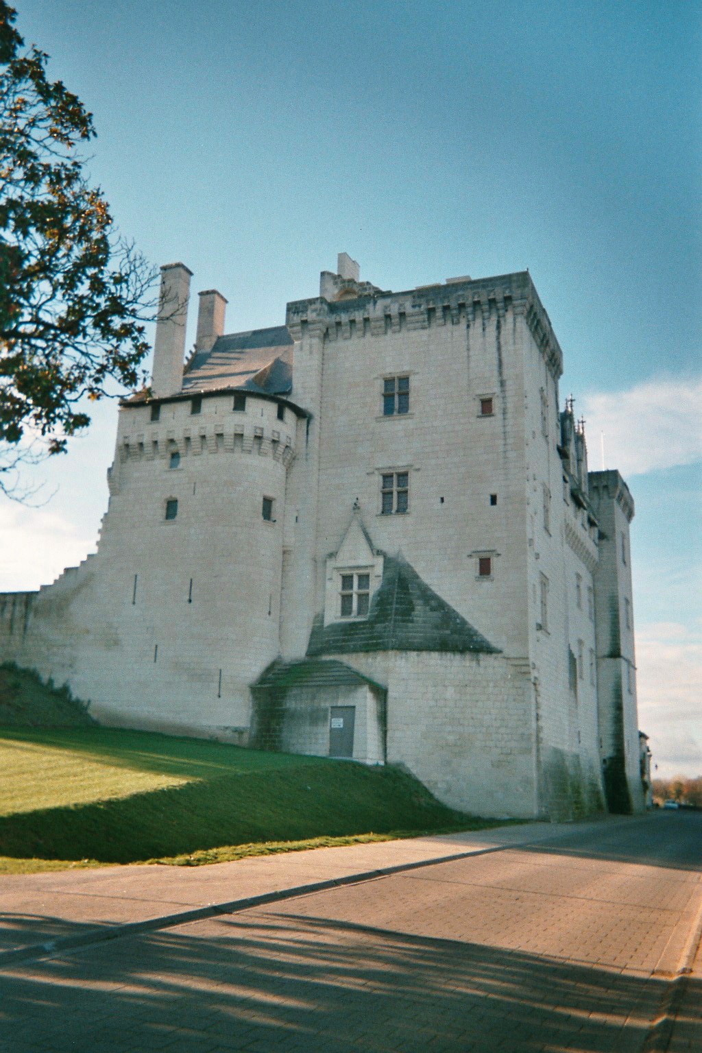 Château de Montsoreau Loire Ouest Tours France 041123 Melusin M:) Melusin propriétaire des négatifs. This building is en partie classé, en partie inscrit au titre des Monuments Historiques. It is indexed in the Base Mérimée, a database of architectural heritage maintained by the French Ministry of Culture, under the references IA49009670 and PA00109211 .